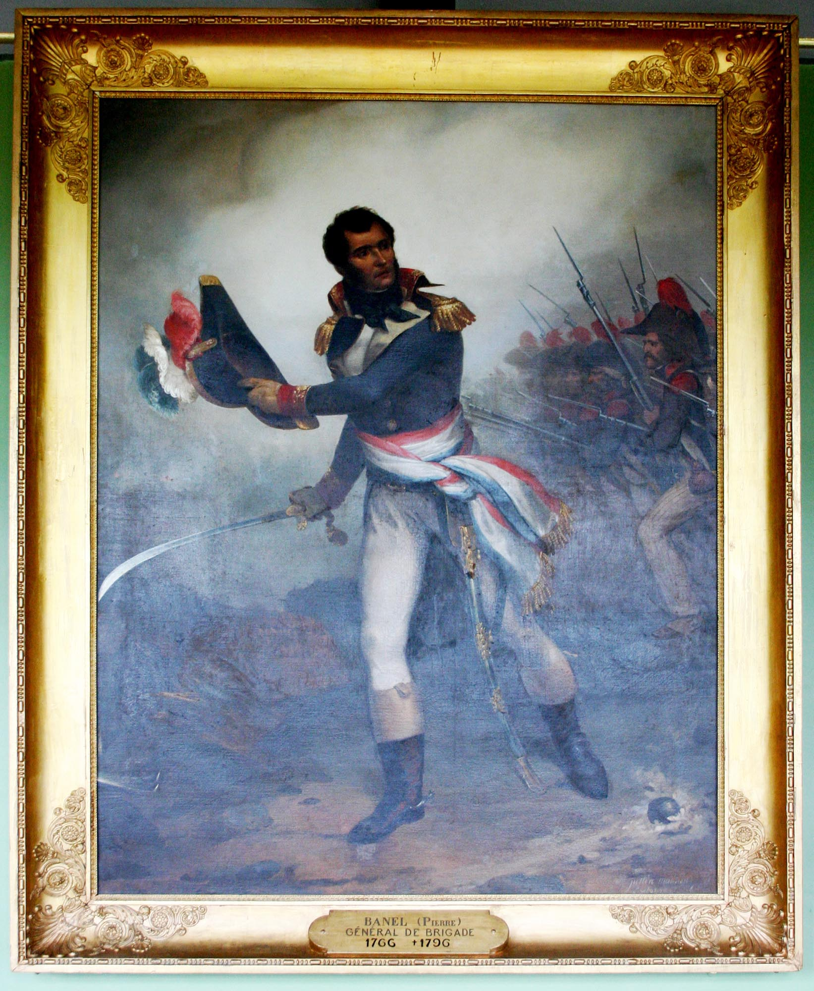 Portrait du général Banel, salle des illustres, Lectoure (Gers, France)